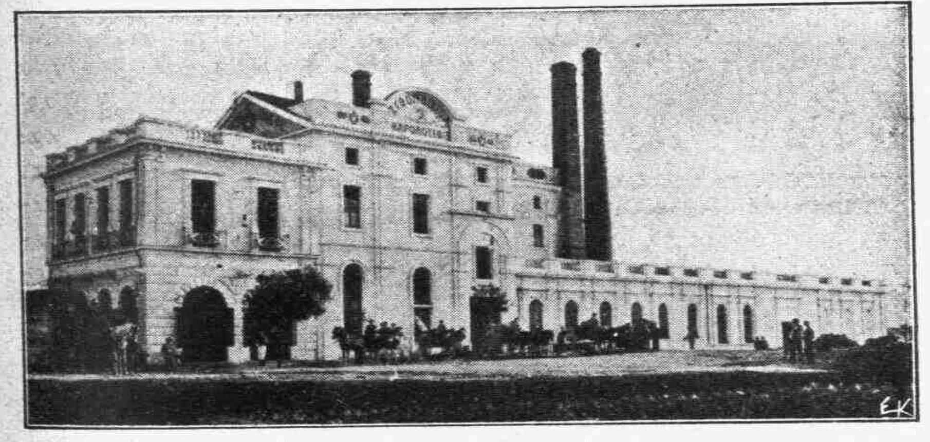 griechische Brauerei Fix, Athen, 19. Jahrhundert